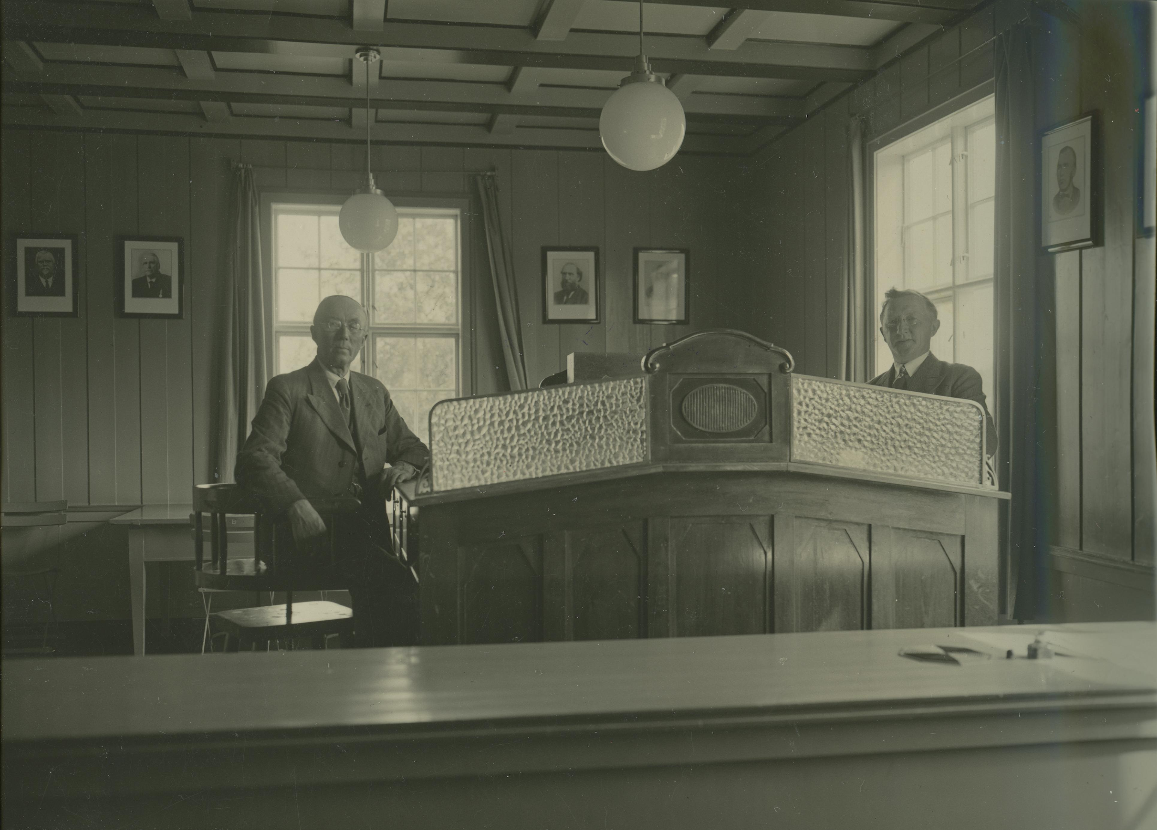 Fra Aasen Sparebanks lokaler i Heradshuset en gang på 1930-tallet. Til venstre sitter styreformann John Wold (f. 1870 i Åsen, d. 1951), til høyre kasserer Ragnar Fiskvik (f. 1885 i Skatval, d. 1972). Begge tiltrådte i 1933. Fotograf / Photographer: Ukjent Fotoeier / Photo owner: Øyvind Fiskvik Digitalisering / Digitizing: Arne Langås (2011) Foto-ID / Photo ID: 095-0216 Har du utfyllende opplysninger? Legg gjerne igjen en kommentar nedenfor eller send e-post til . | Do you have additional information? Please leave a comment or send an e-mail to .